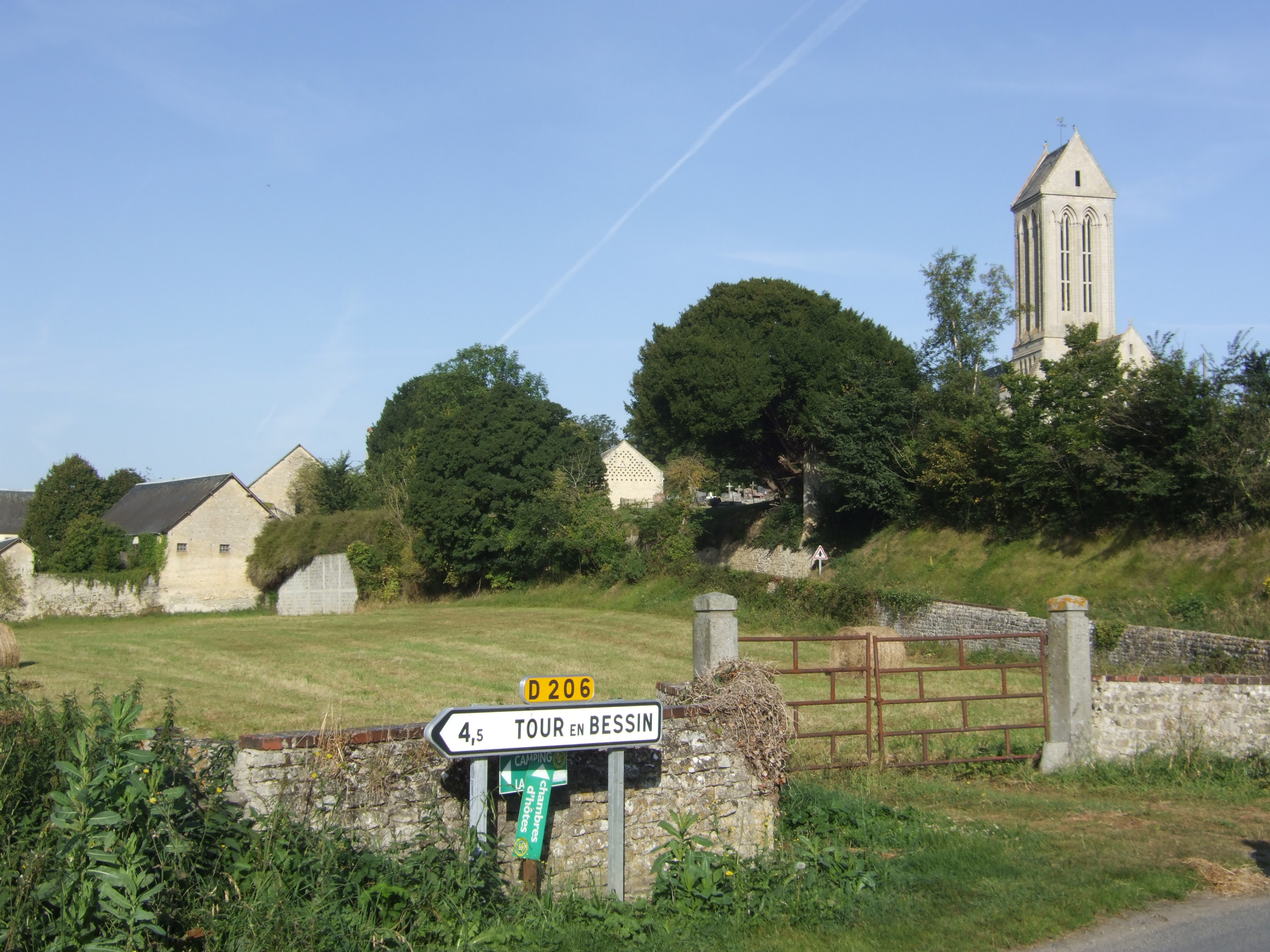 Vue d'ensembre de la Ferme de la Marguerie et l'Église Saint-Romain d'Étréham .